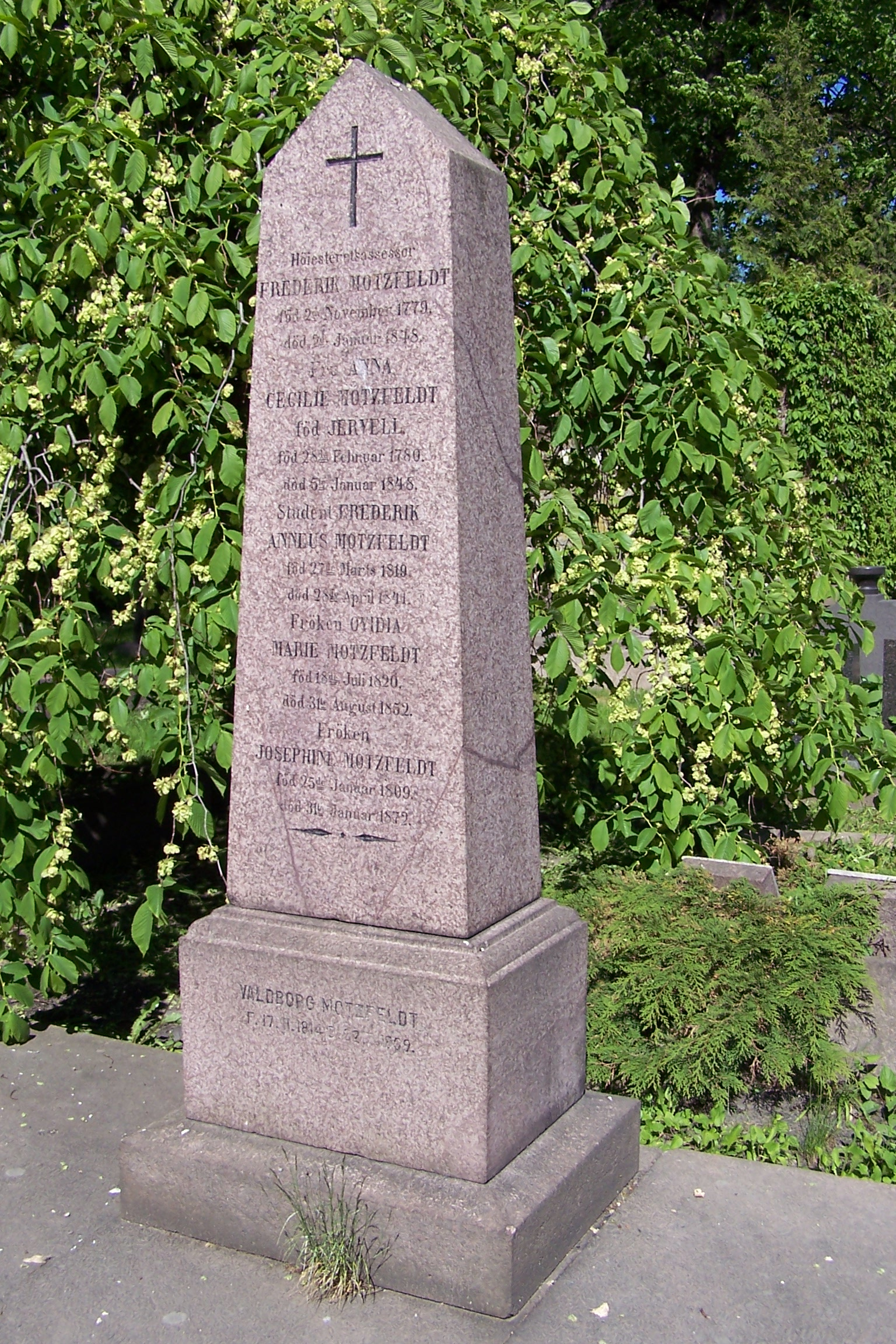 Tomb of Frederik Motzfeldt at Vår Frelsers gravlund, Oslo